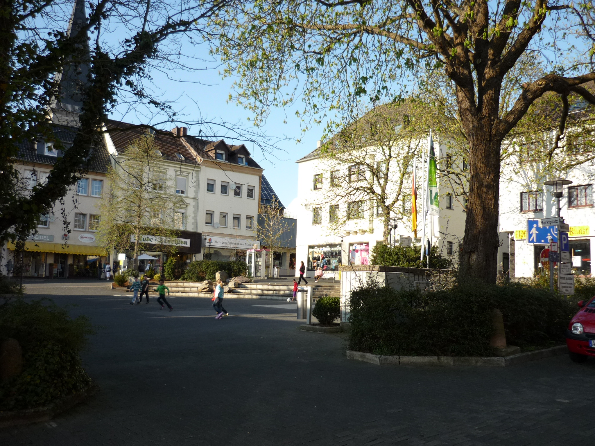 Marktplatz Altenkirchen /WW